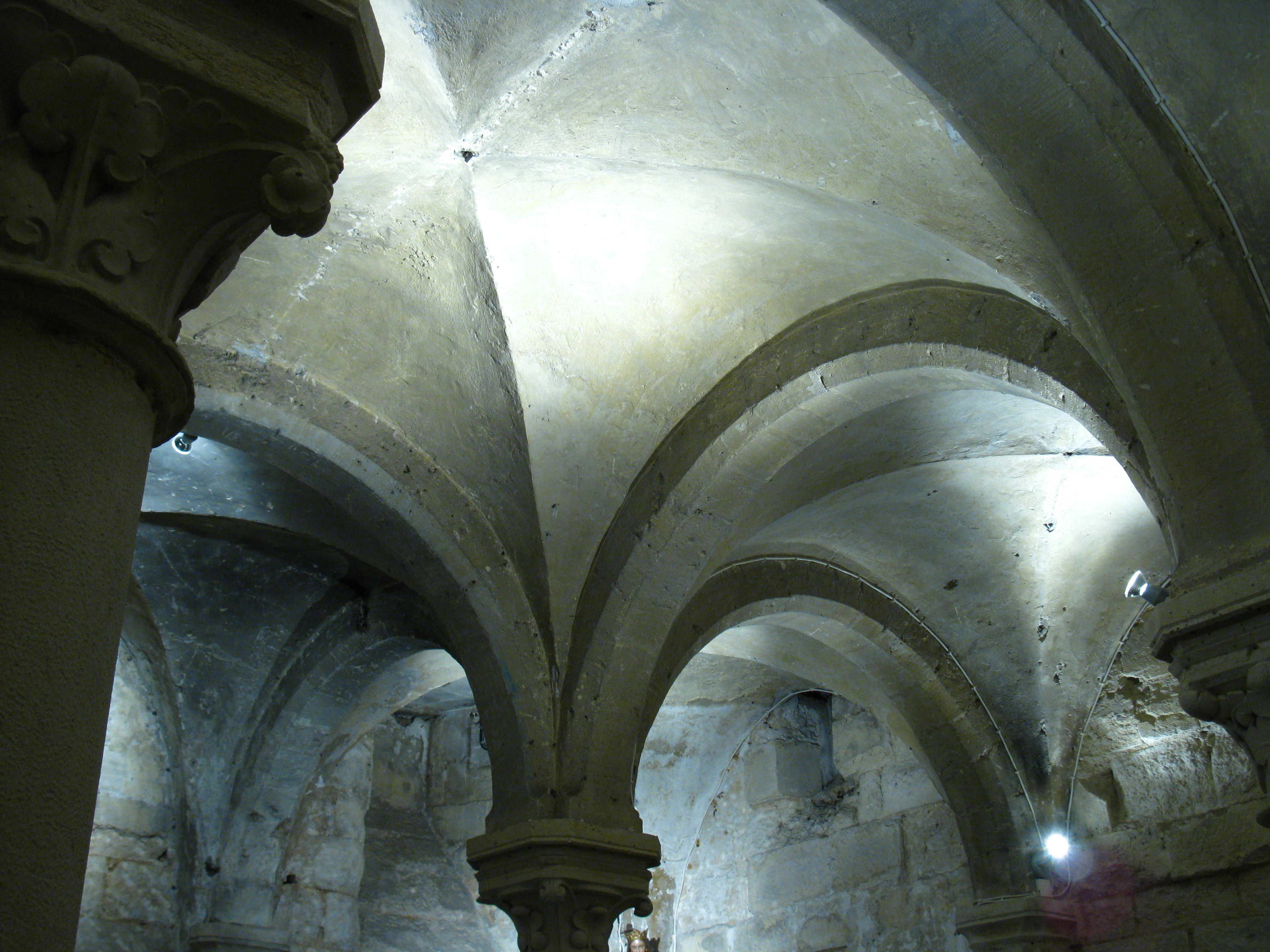 Voûtes et chapiteaux de la crypte de l'église Saint-Christophe de Créteil (94) ; photo prise pendant les journées du patrimoine .